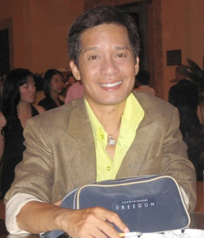 Minh Nhí trong một buổi tiệc